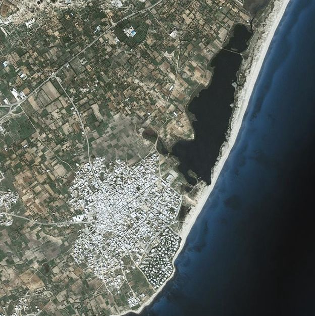 Ville d'El Maâmoura et Sebkha El Maâmoura, Cap Bon, Tunisie.